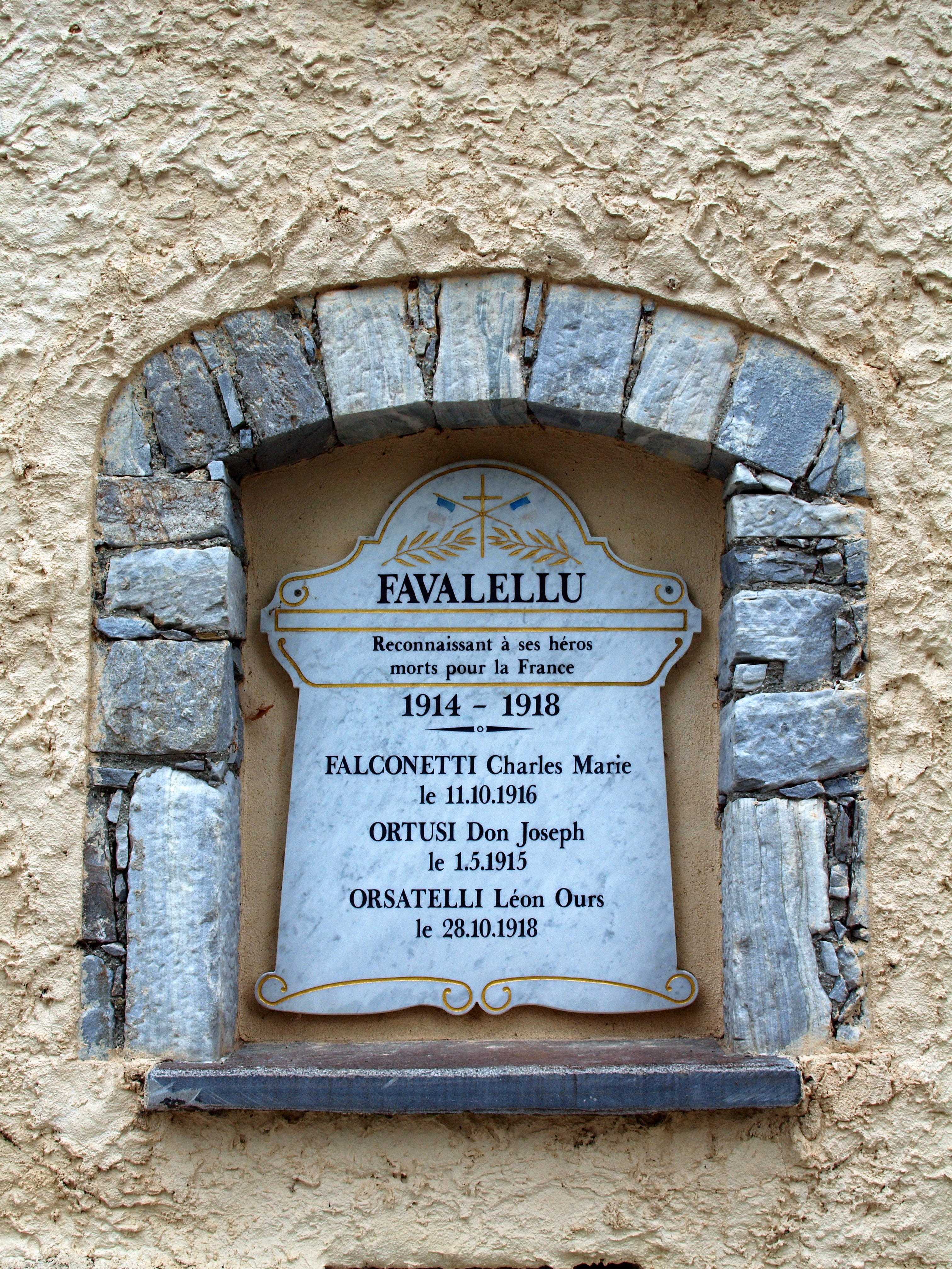 Favalello, Bozio (Corse) - Plaque commémorative Guerre 14-18